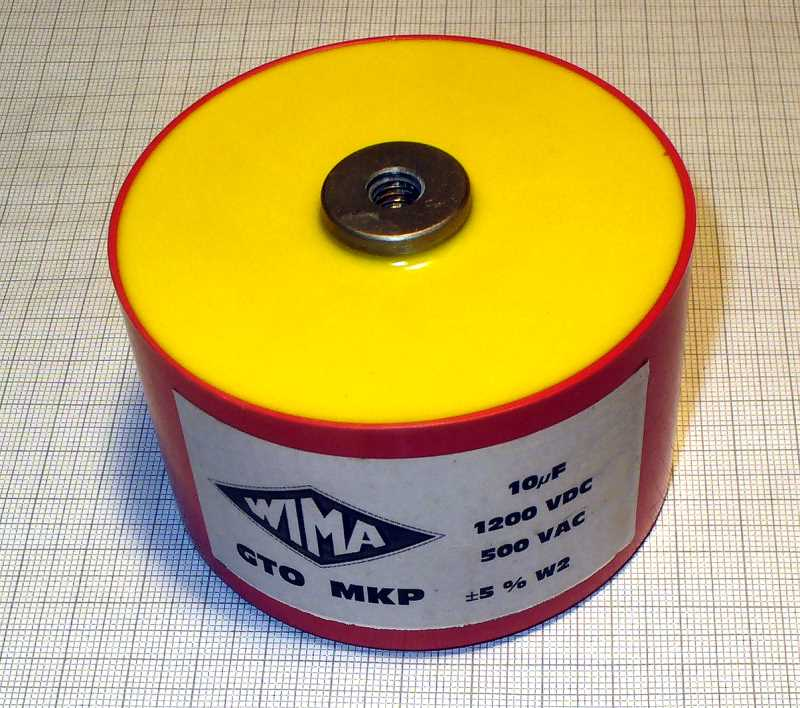 Polypropylen-GTO-Kondensator